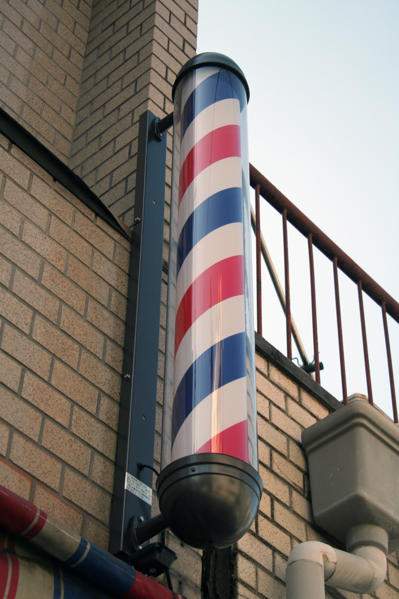 日本にある理髪店の看板。